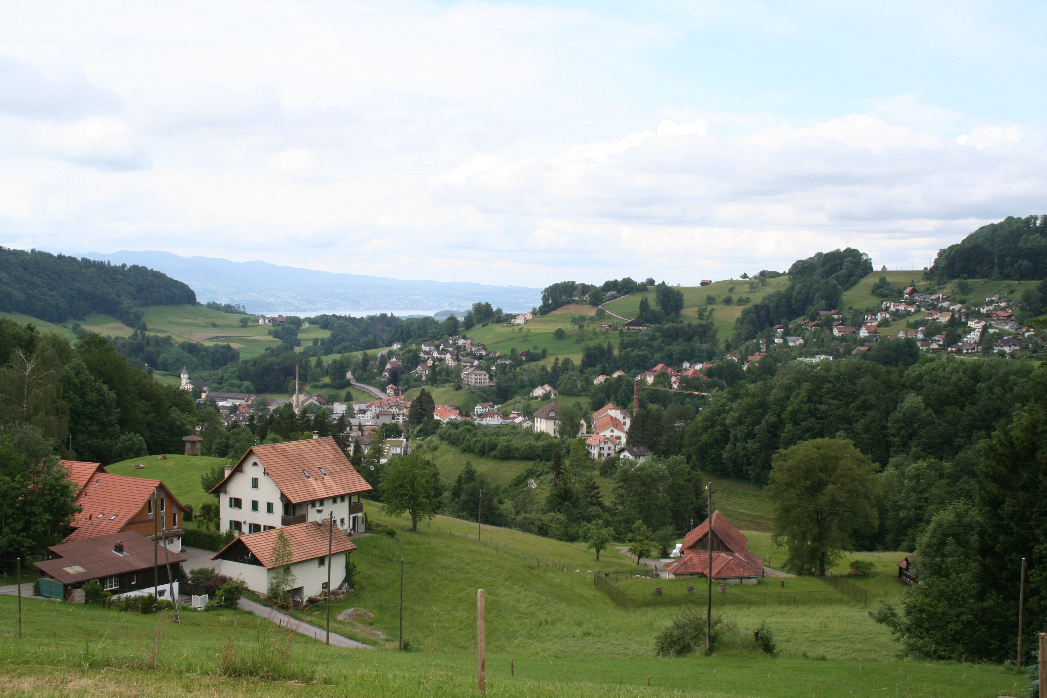 Vorderwald (Hittenbergstr., 47.2815 N, 8.9252 E) bei Wald ZH, Blick nach Osten zum Ortskern von Wald, im Hintergrund der Zürichsee.